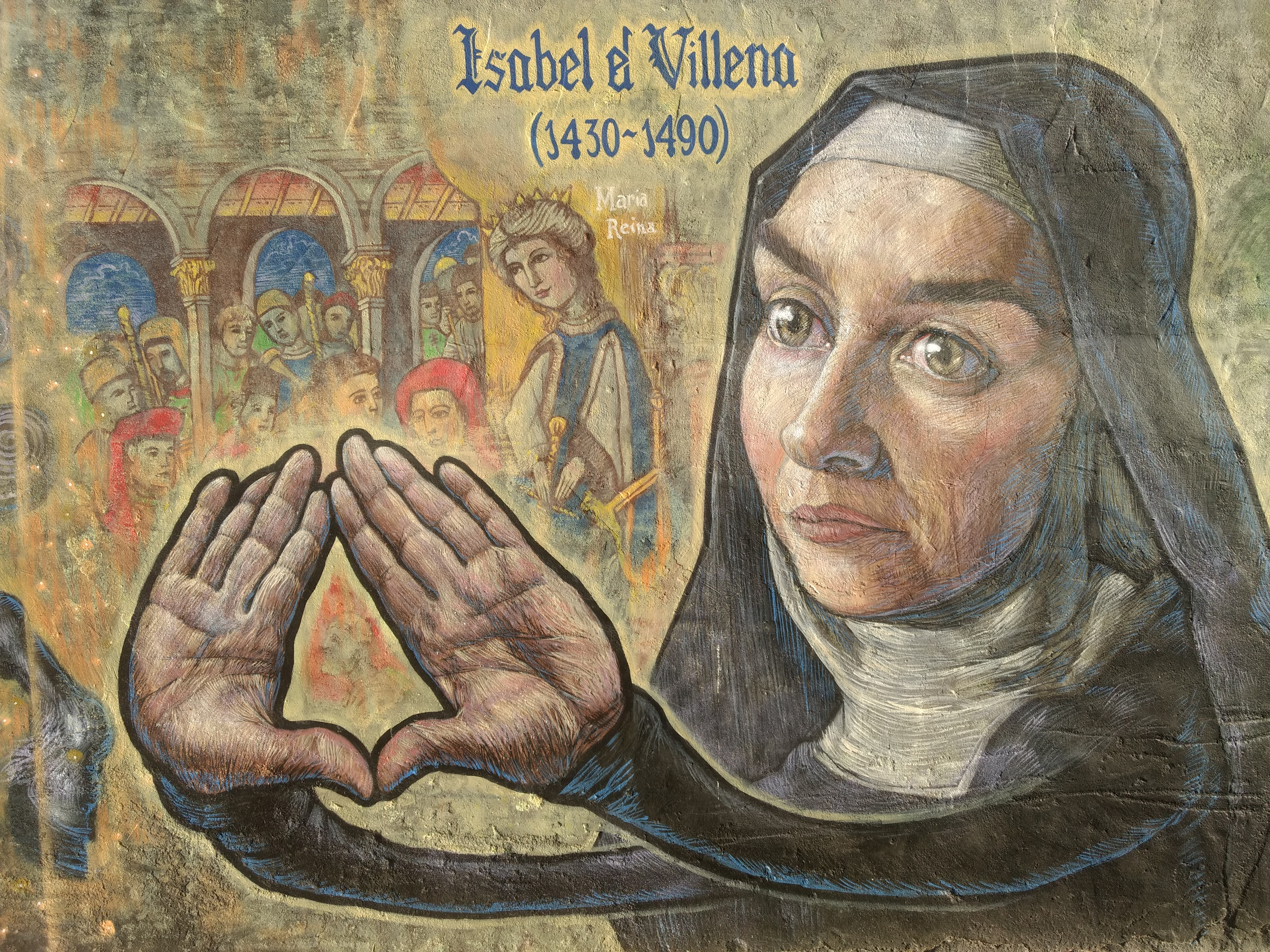 Vista del Mural en estiu de 2017, després de la segona fase del mateix.Murals amb escriptors realitzats per Toni Espinar al Passeig de la Batà de Muro. Isabel de Villena.